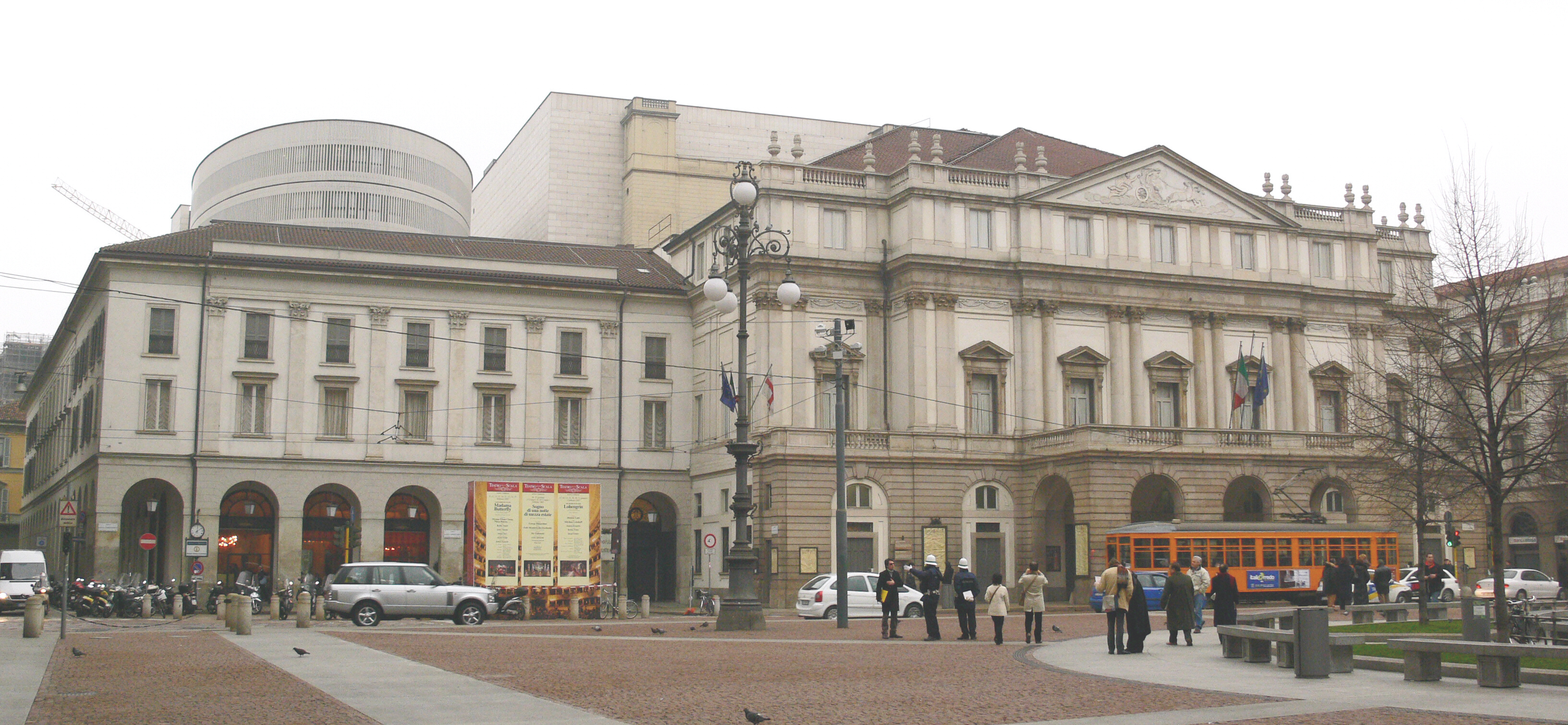 Teatro alla Scala, Milano, Italia